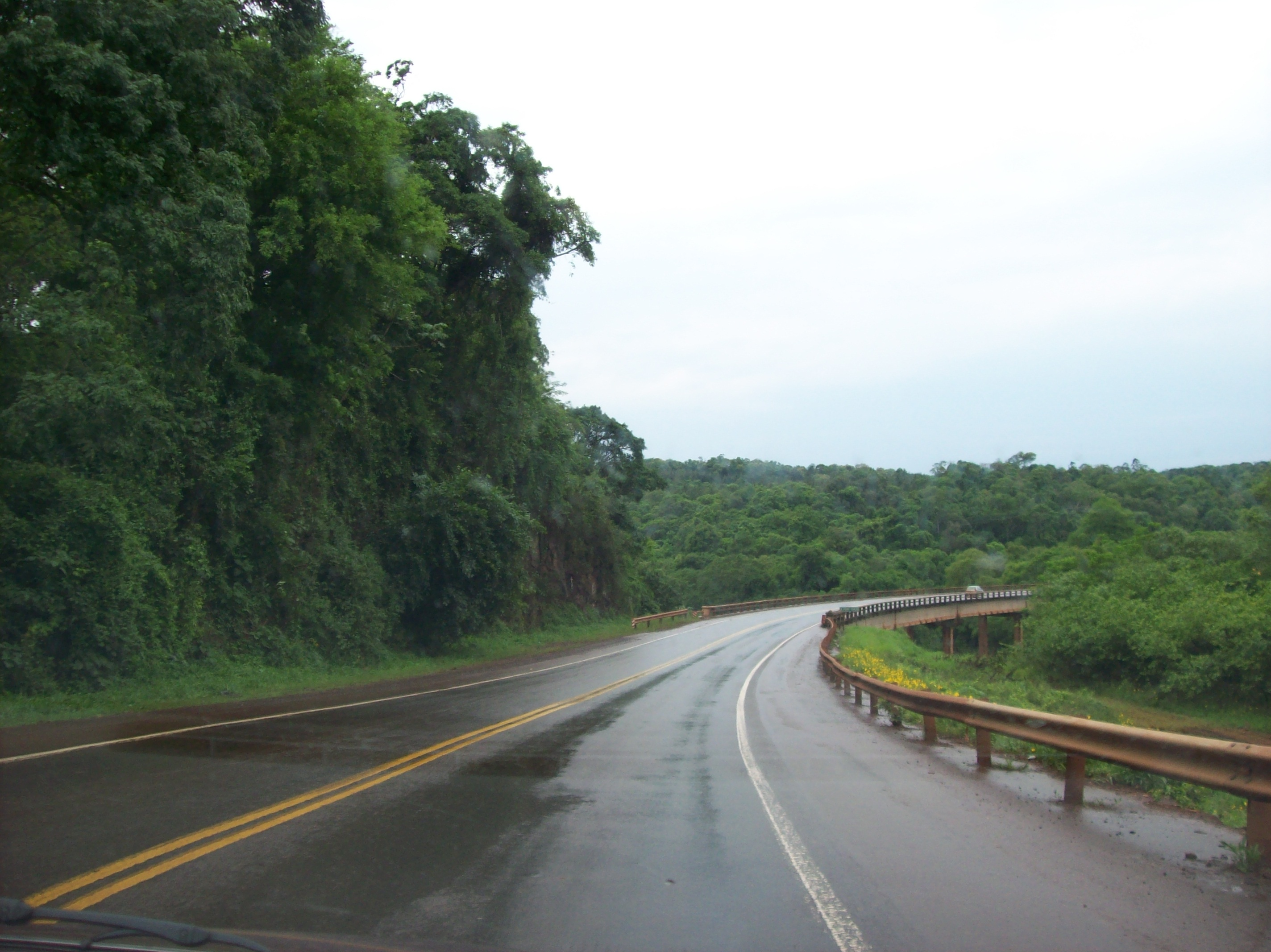 Puente de la Ruta Nacional 12 sobre el arroyo Piray Guazú, límite entre los departamentos Montecarlo y Eldorado, en la provincia de Misiones, Argentina. Inaugurado en 1969.